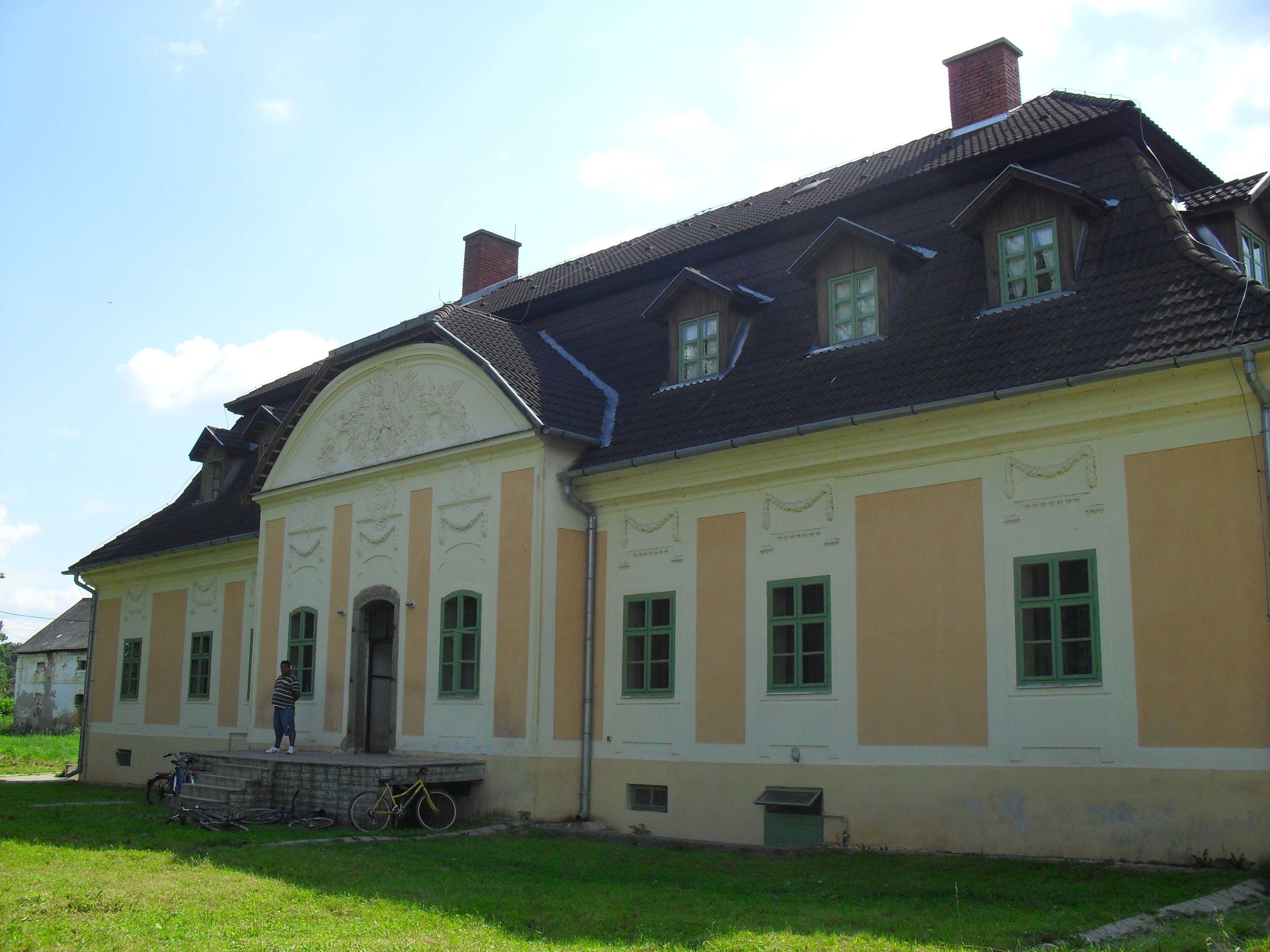 Lice - kastély